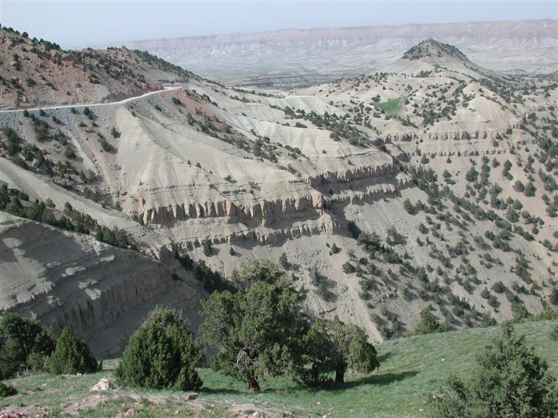 Горный хребет Сафедкох, провинция Герат. Фото. Original description by Jayanth Vincent: The stark yet beautful landscape is captivating to the extreme. On the top left is the road to Qualainau, a province west of Herat, 12 hours drive on rocky river beds away.